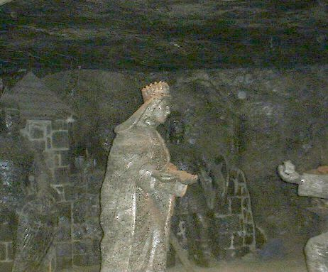 Salzskulptur "Kinga" in Wieliczka